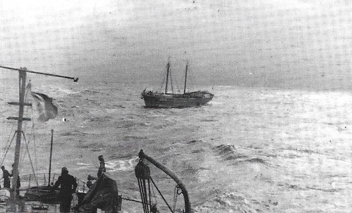 אח"י מעוז גוררת את האונייה נרקיס הנמצאית ללא שליטה במבואות נמל טריפולי לבנון 13 נובמבר 1948.